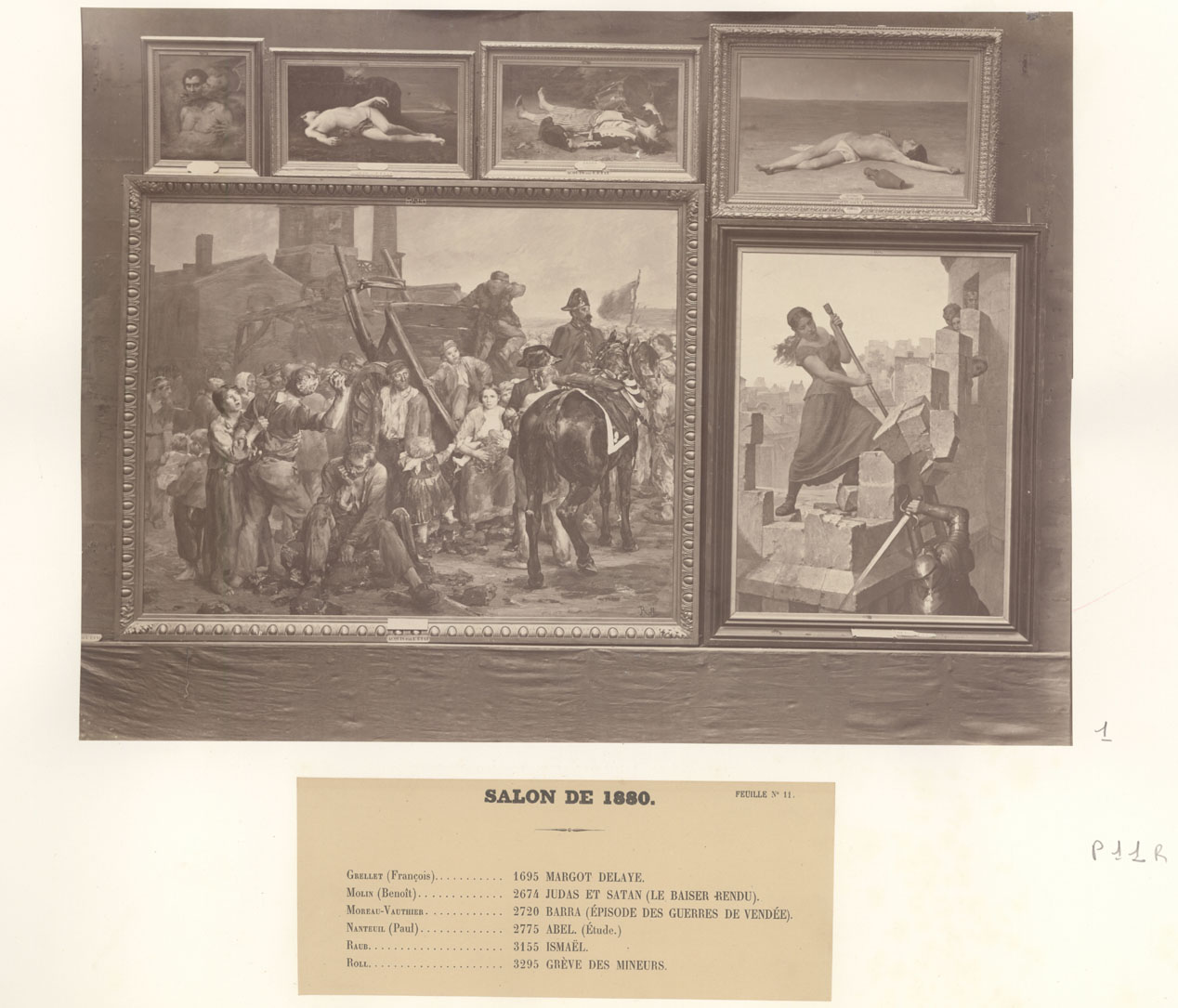 "Margot Delaye", tableau par François Grellet, No 1695, acquis par l'Etat; le tableau mesure 305 x 225 cm.Salon de 1880 source: Ministère de la Culture date: 30 décembre 2006 auteur: Olivier Ponsoye